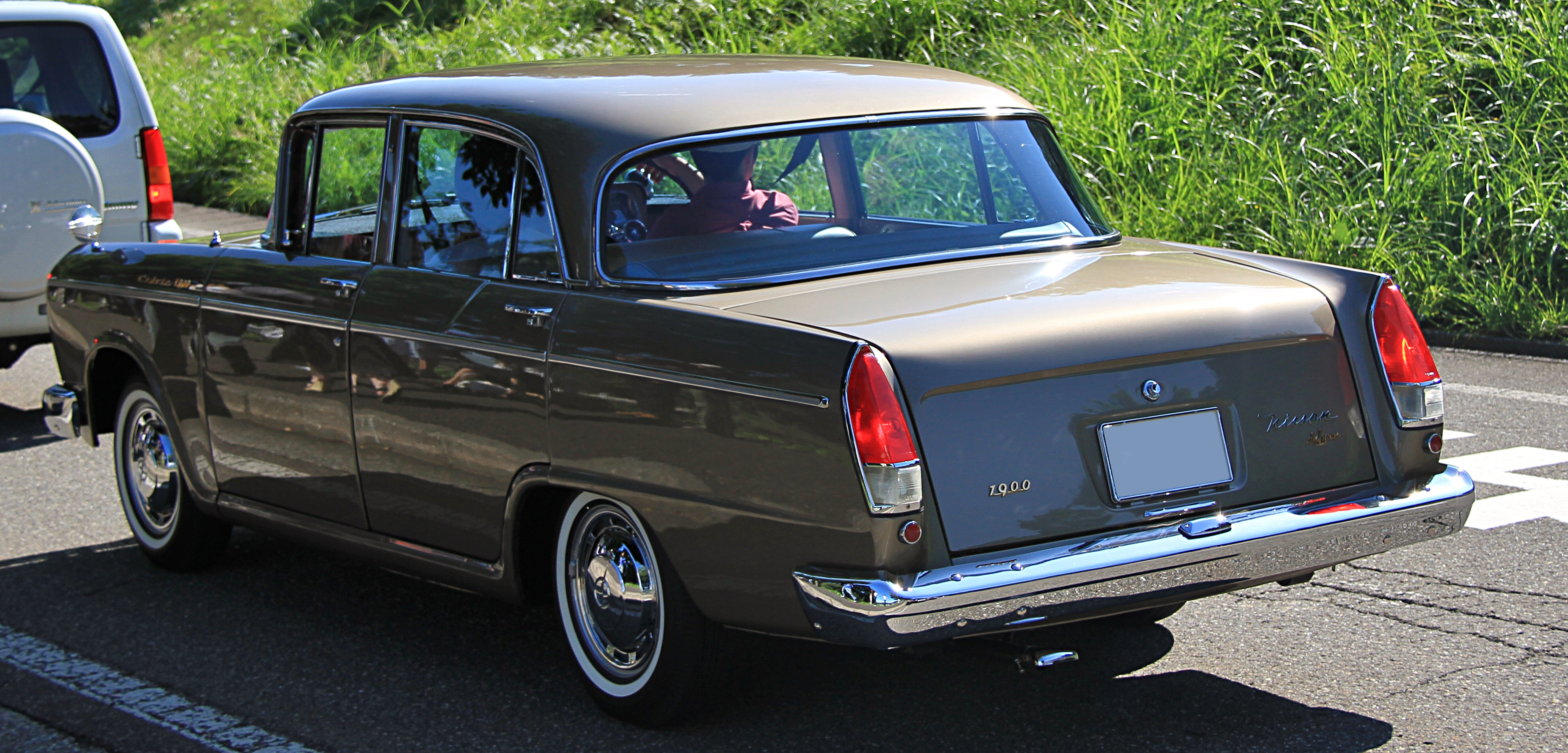 Nissan Cedric